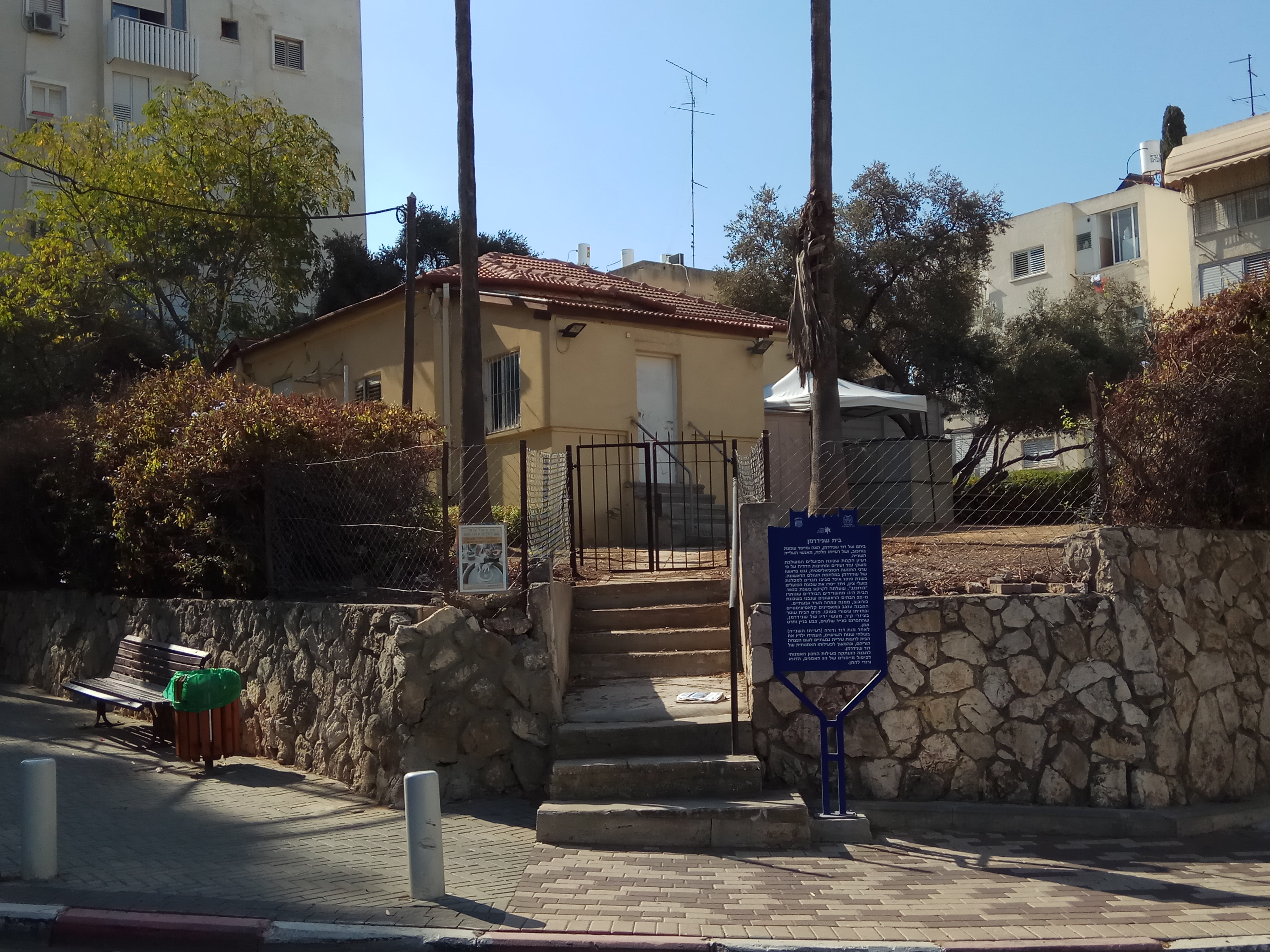 הכניסה המקורית לבית שניידרמן בשכונת בורוכוב